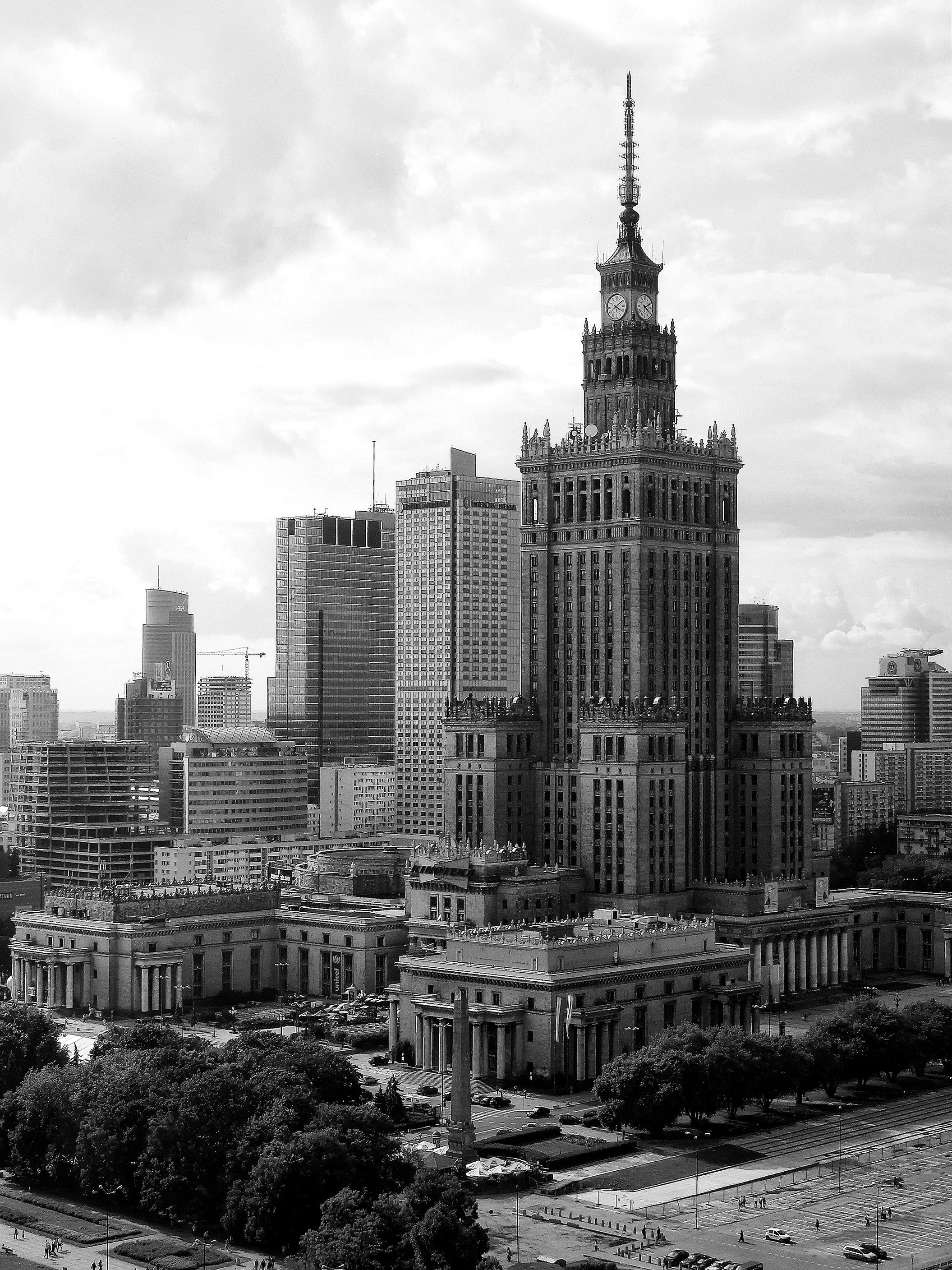 Palais de la culture, Varsovie